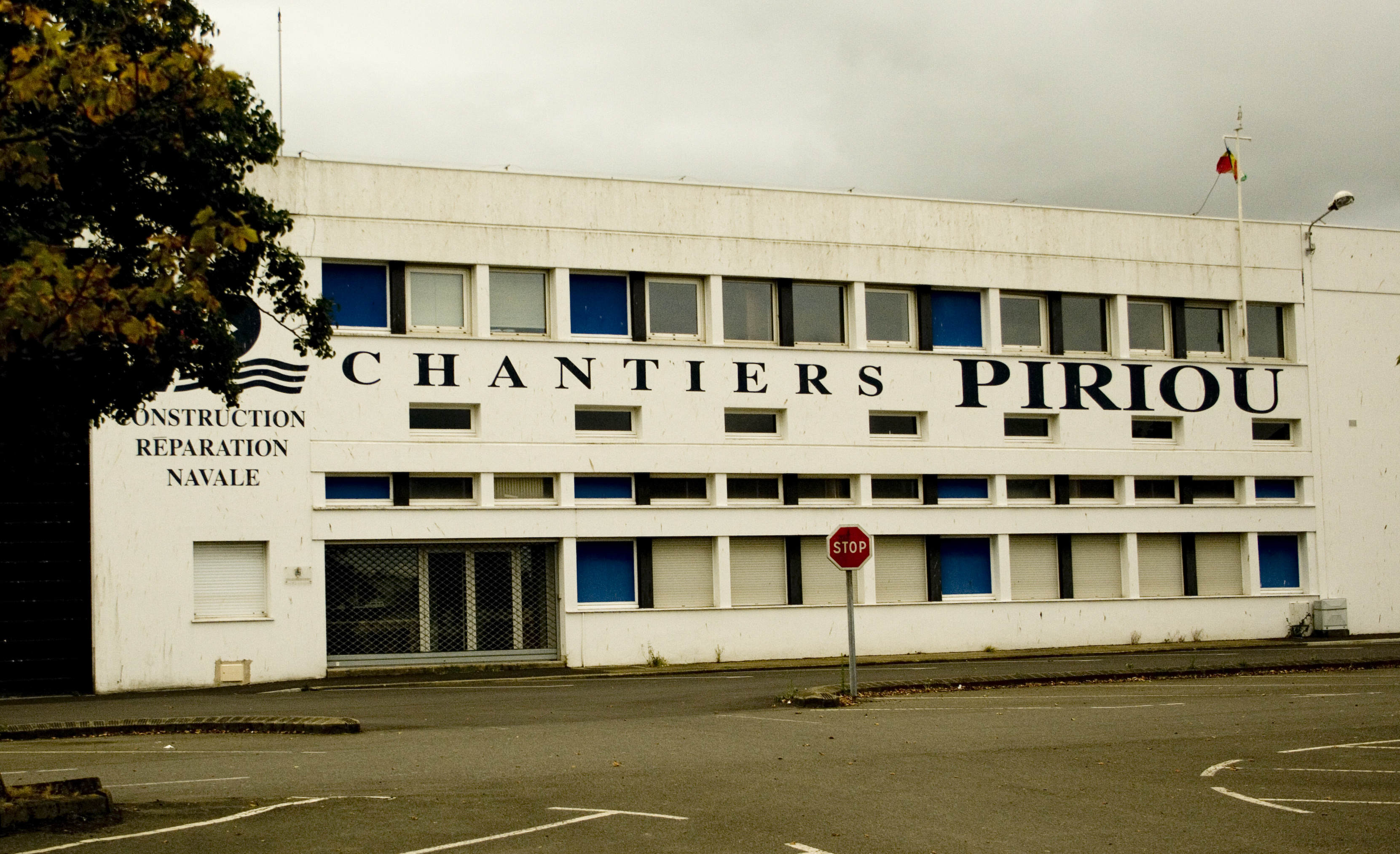 Bâtiment des chantiers Piriou à Concarneau